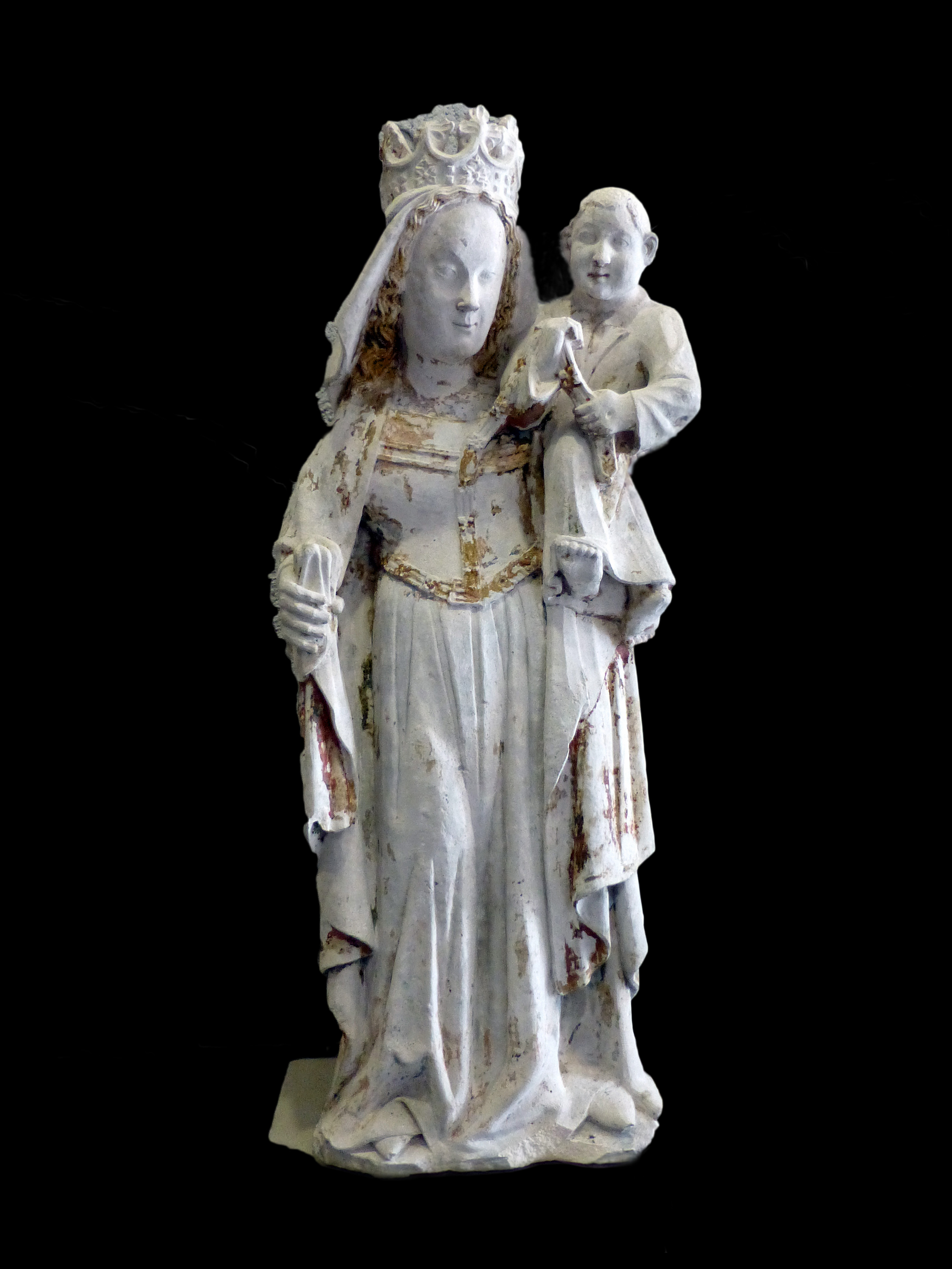 La Vierge et l'Enfant. XVe siècle. Provient de l'ancien hôpital de Gerbonvaux (Vosges). Musée départemental d'art ancien et contemporain.